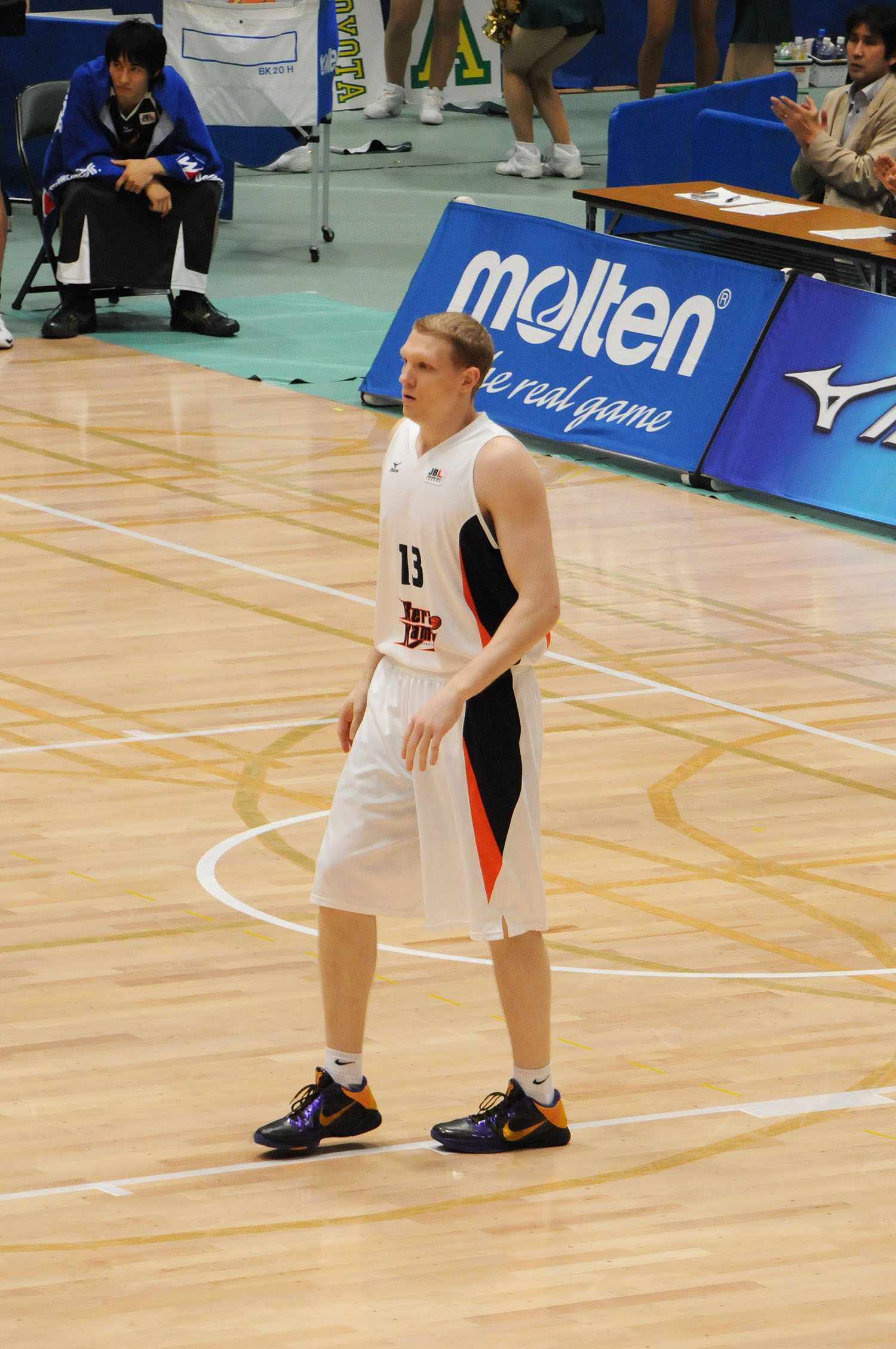 レラカムイ北海道のクリスチャン・マラカー選手。墨田区総合体育館で。